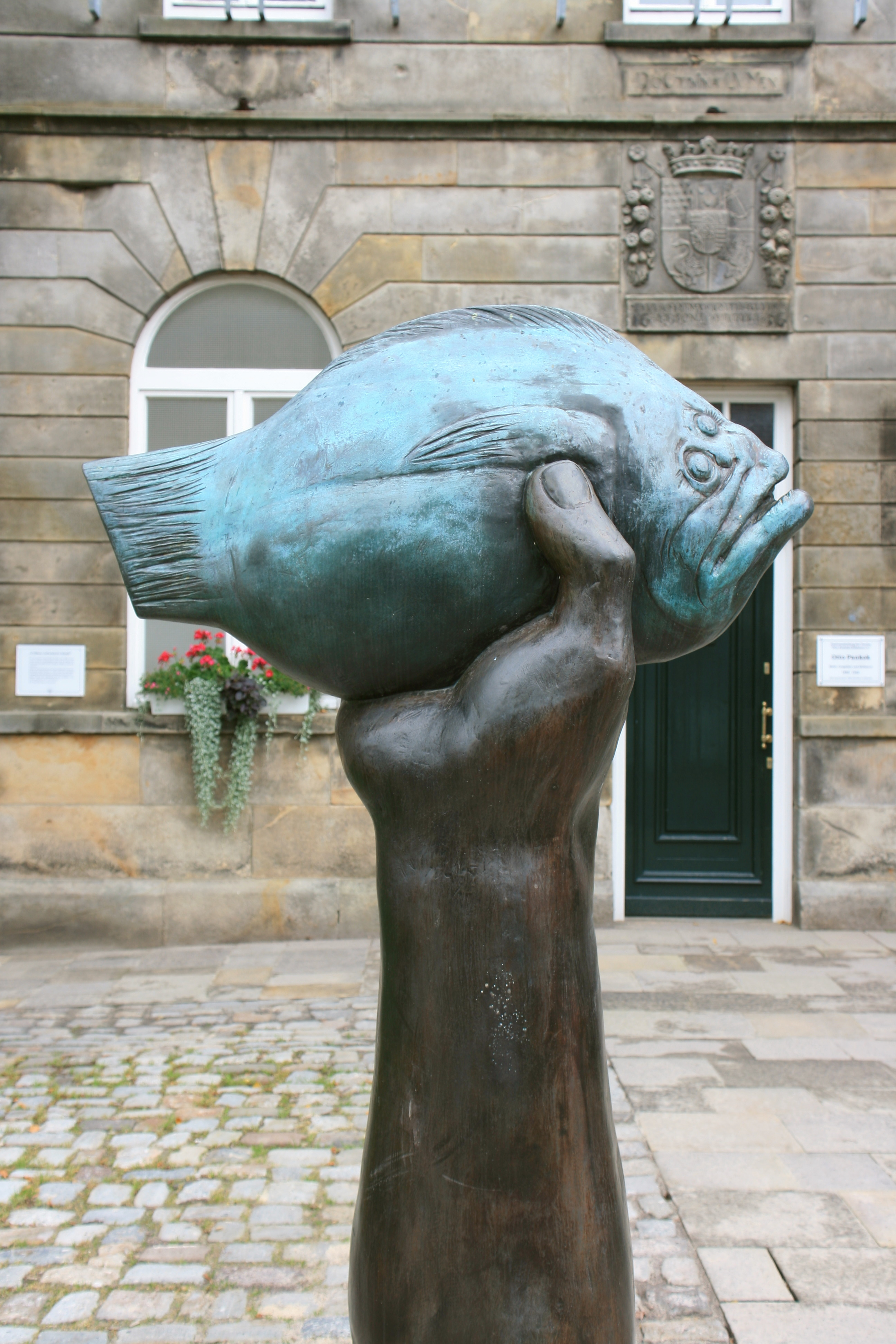 Butt im Griff vor dem Otto-Pankok-Museum, Neuer Weg in Gildehaus Bad Bentheim